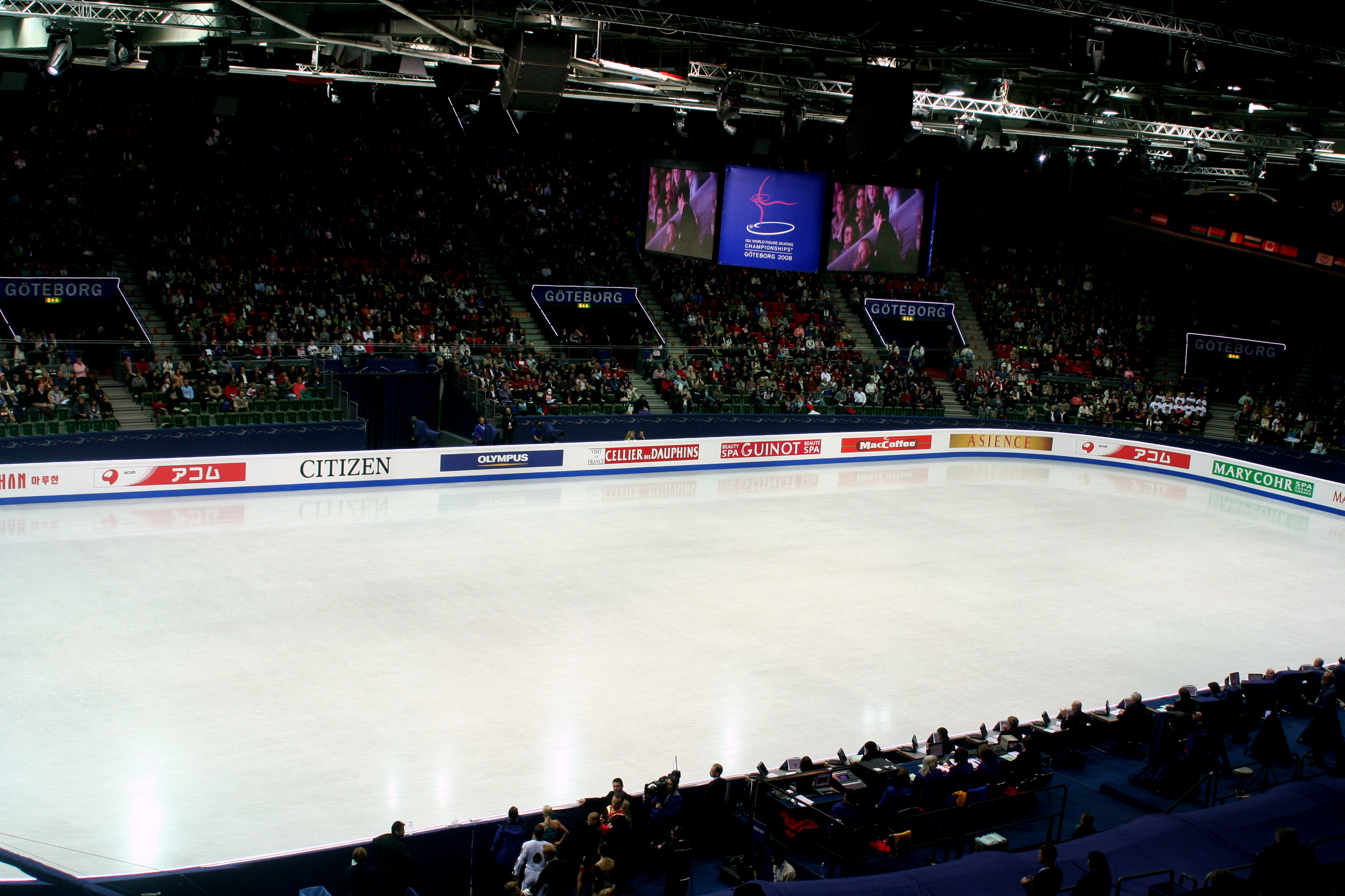 Skating Arena